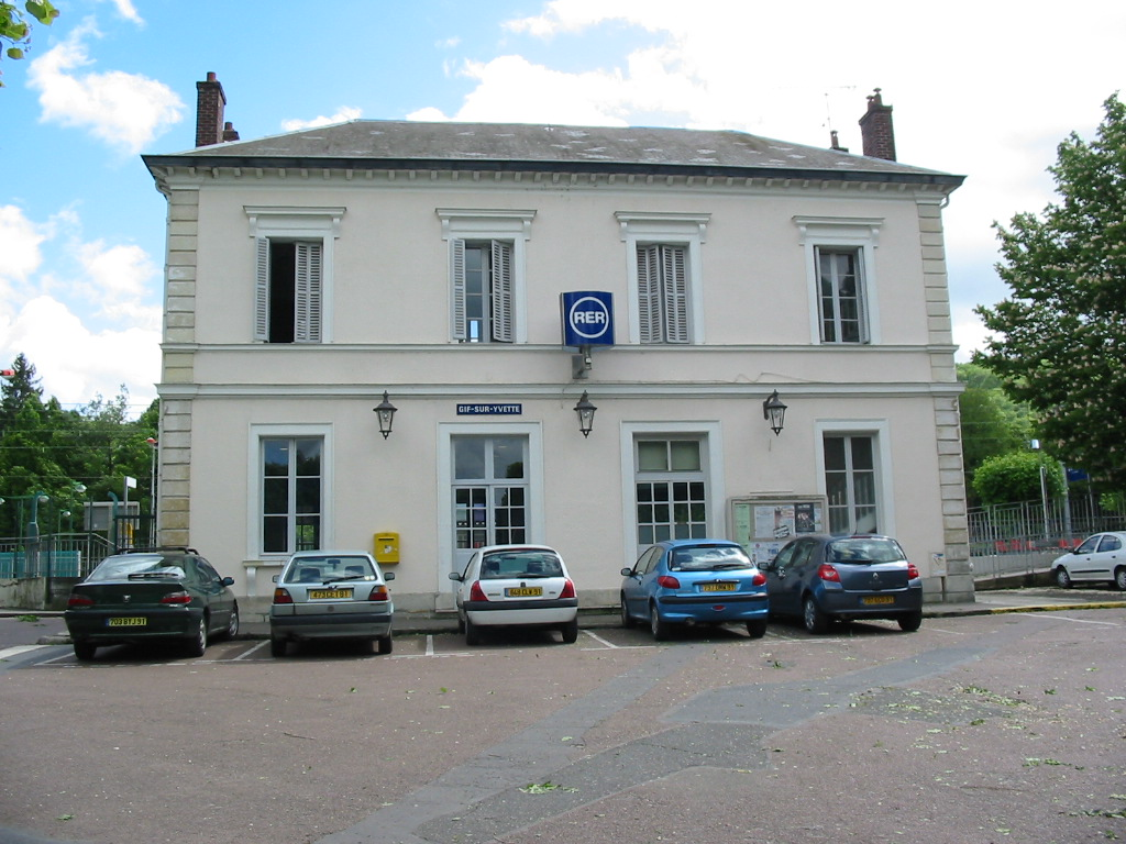 Gare de Gif-sur-Yvette, RER B, France